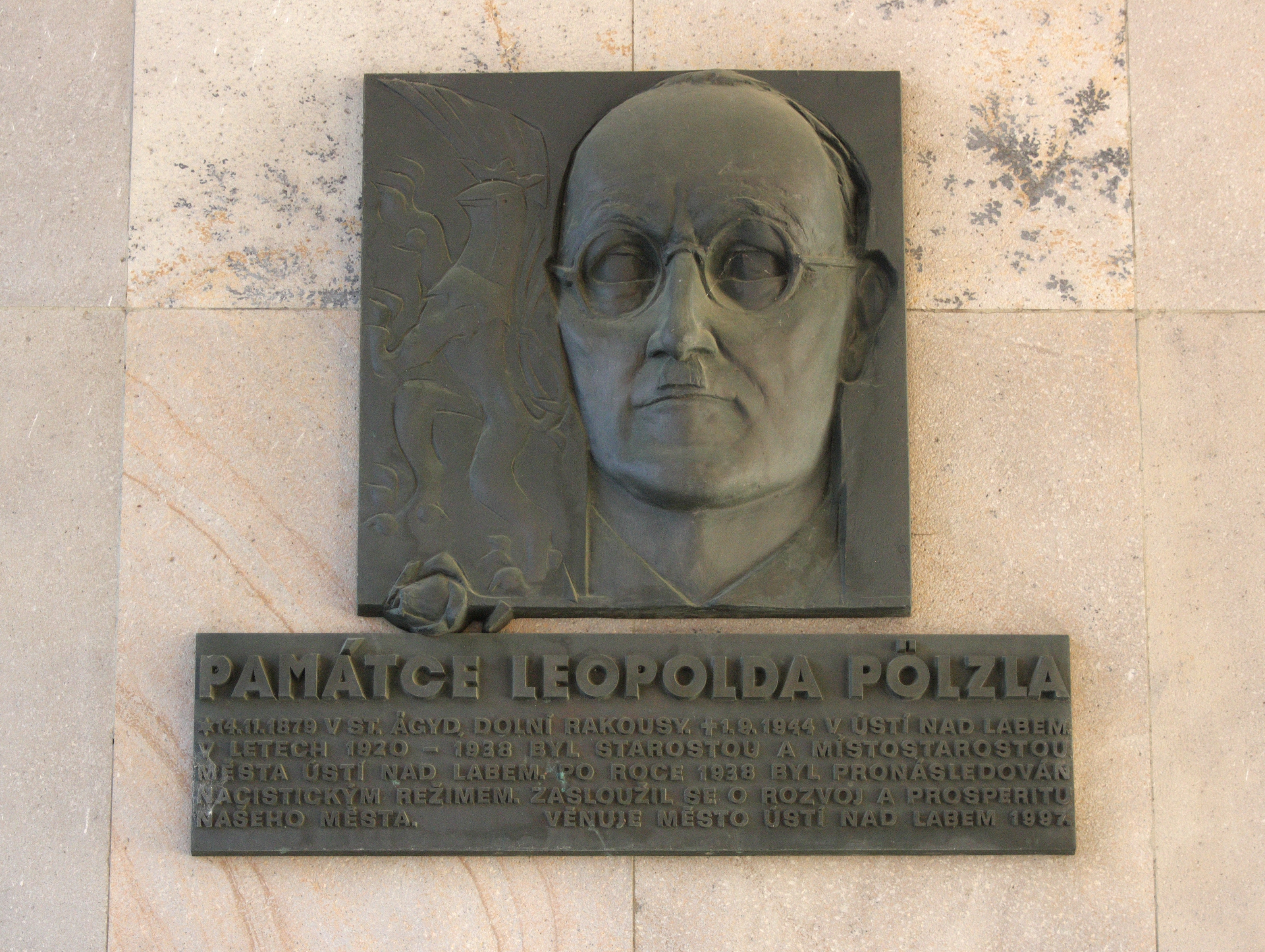 Ústí nad Labem - budova magistrátu, pamětní deska Leopolda Pölzla